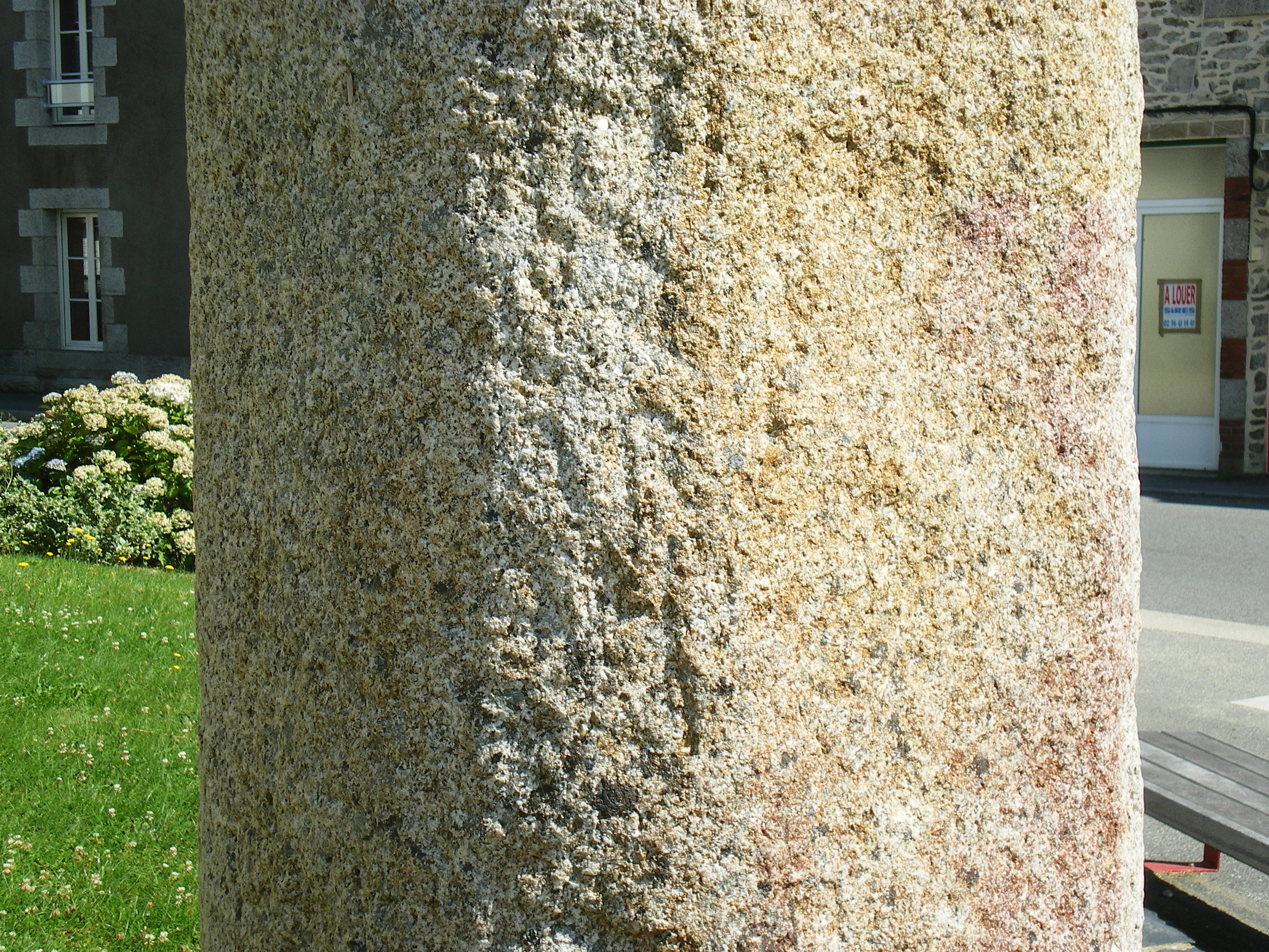 Colonne itinéraire de Maël-Carhaix, détail de l'inscription (quelques lettres semblent assez lisibles : particulièrement AR au centre de l'image).